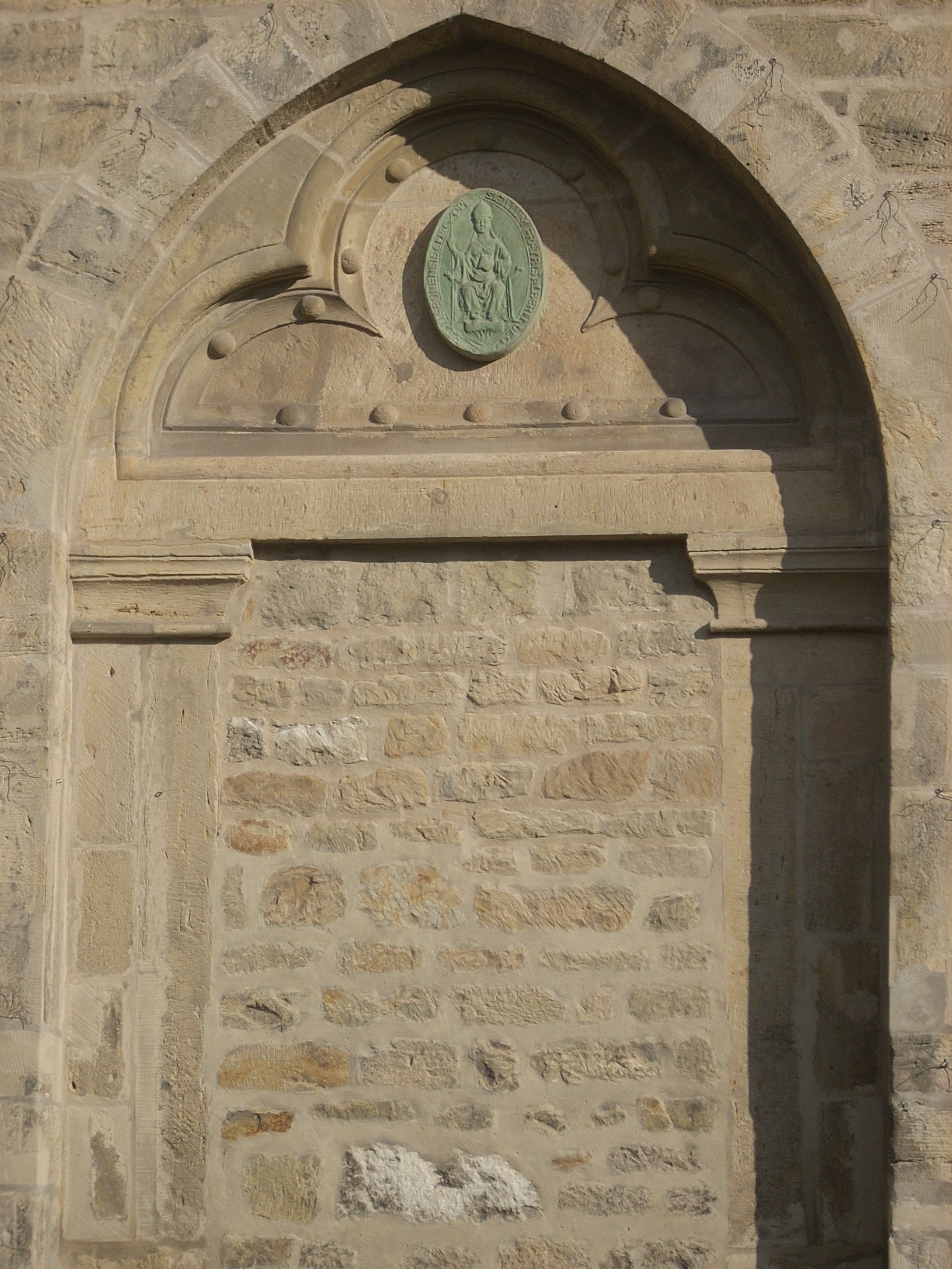 Hildesheim, ehem. Dominikanerkirche St. Paulus, vermauertes Westportal mit dem Bischofssiegel des hl. Albertus Magnus